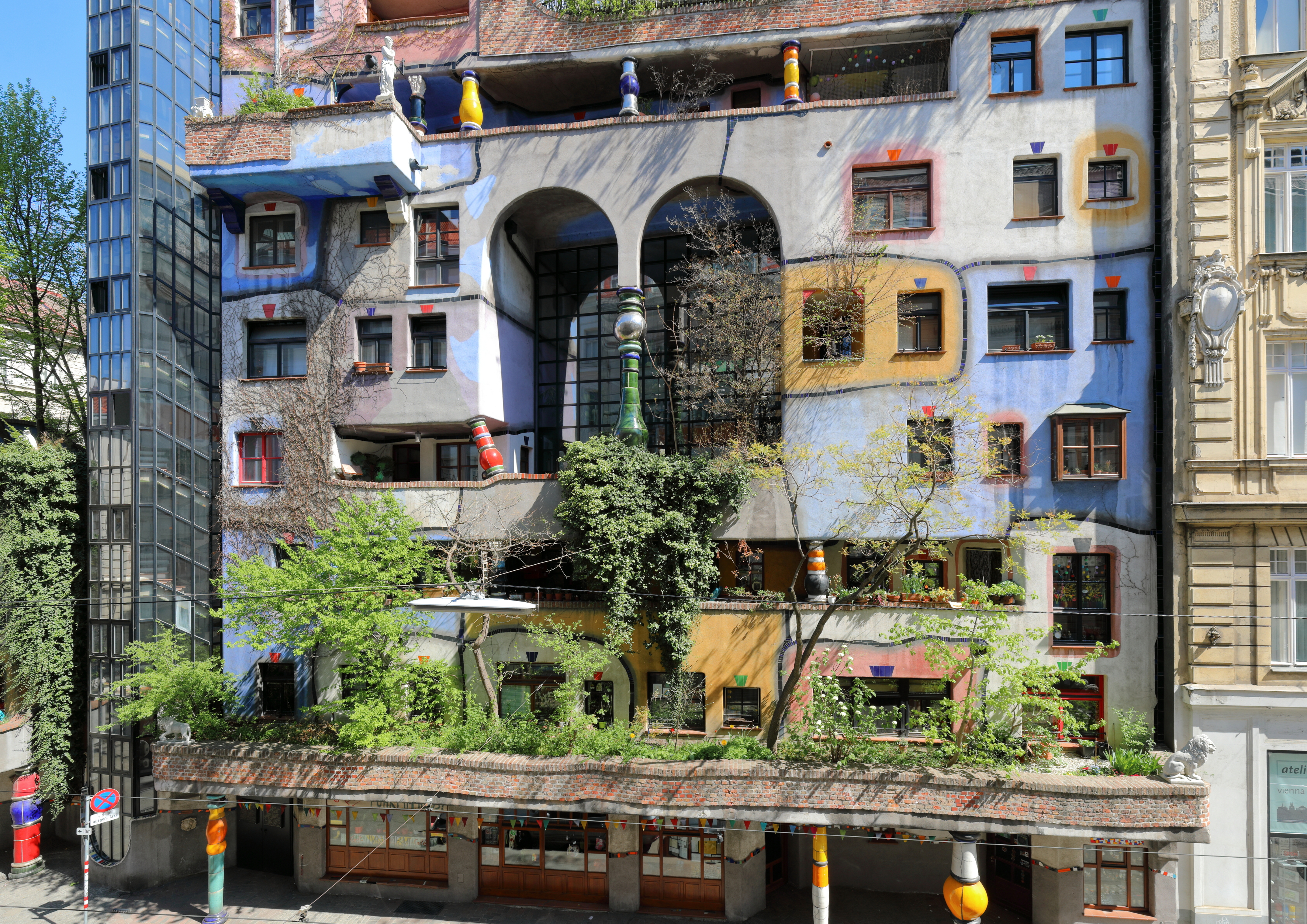 Die Fassade des Hundertwasserhauses in der Löwengasse im 3. Wiener Gemeindebezirk Landstraße.Die Wohnhausanlage der Gemeinde Wien mit 50 Wohneinheiten wurde als Ökohaus an der Ecke Kegelgasse/Löwengasse von 1983 bis 1985 errichtet. Entworfen wurde sie von dem Künstler Friedensreich Hundertwasser, anfangs in Zusammenarbeit mit dem Architekten Josef Krawina. Nach dem Zerwürfnis Hundertwasser mit dem Architekten Krawina, wurde die Wohnhausanlage mit dem Architekten Peter Pelikan fertiggestellt.